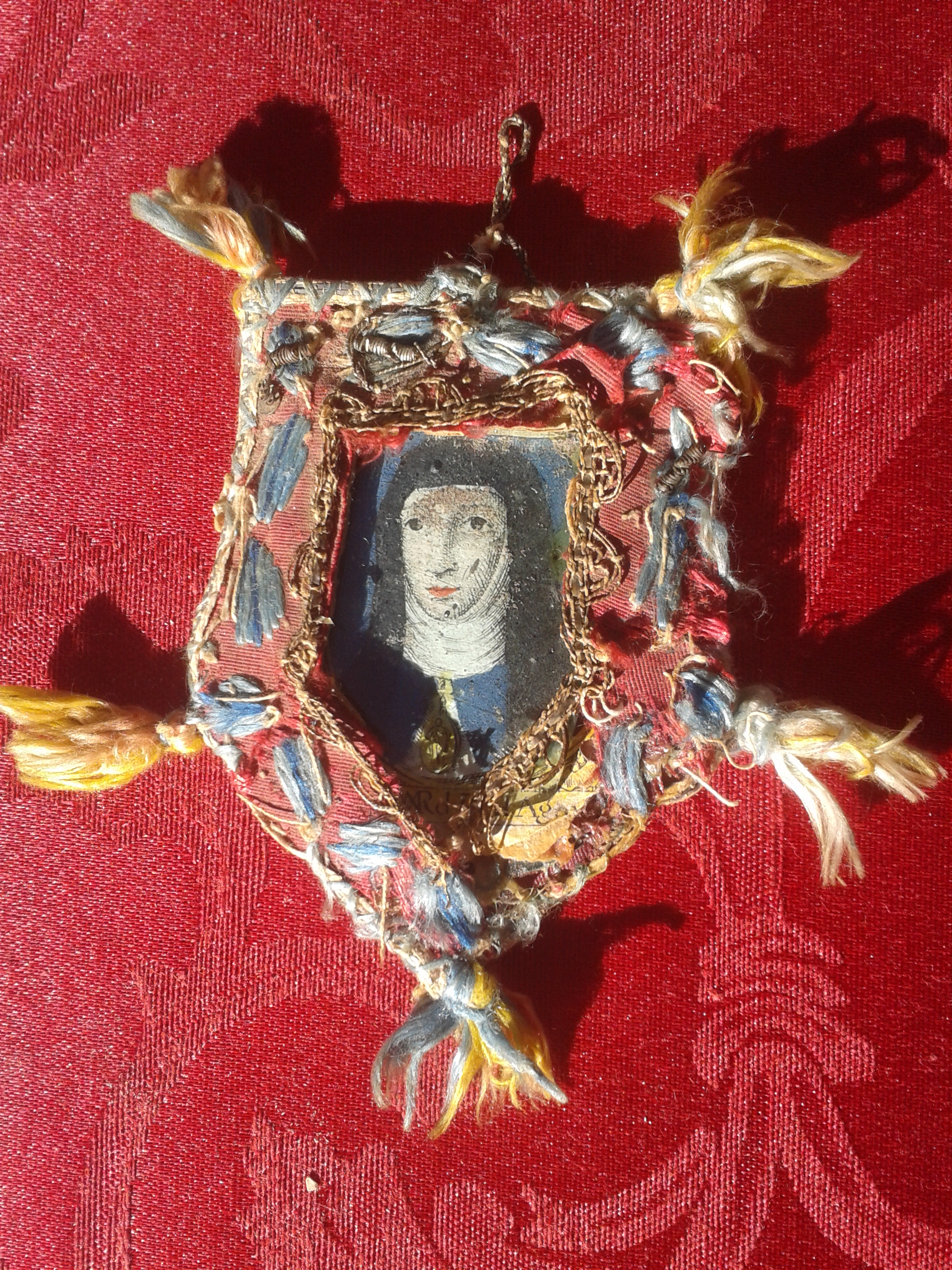 Relicario con la imágen de la Venerable Madre Sor María de Jesús de Ágreda. Ambreso con imágen de la Venerable enmarcado entre bordados de seda con forma pentagonal y rematado por flecos en cada extremo del pentágono. En el reverso hay un conjunto de reliquias de la Venerable Madre